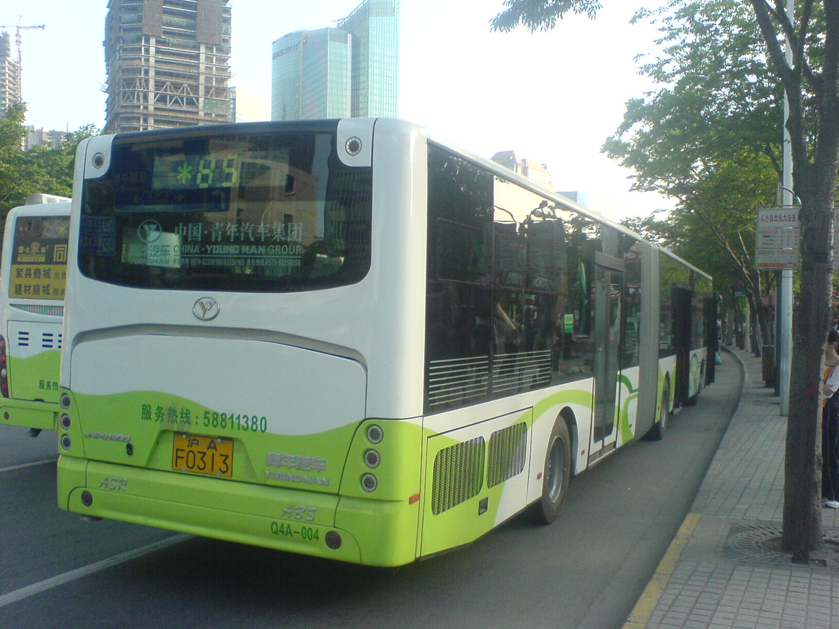 巴士股份的85路公交车